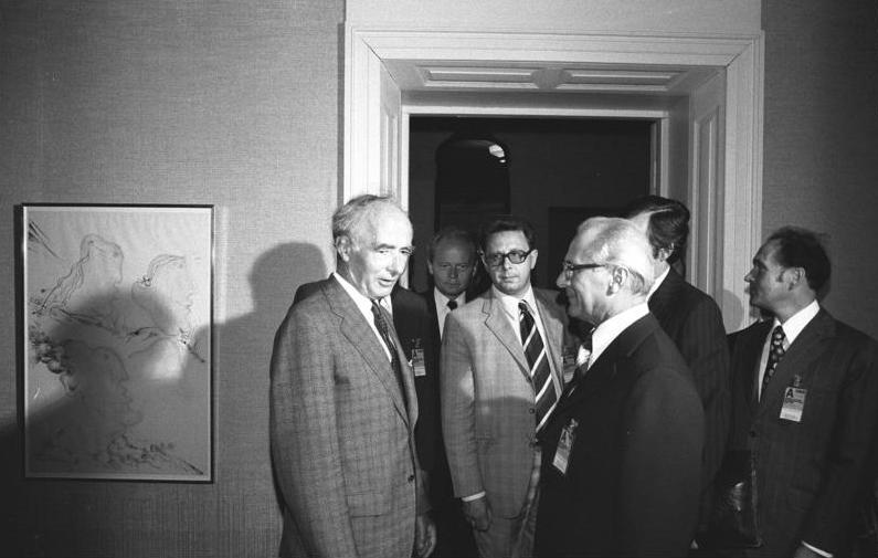 Helsinki, KSZE-Konferenz, Honecker, Trygve Bratelli ADN-ZB / Demme / 30.7.75 Helsinki: Sicherheitskonferenz - Begegnung Erich Honecker und Trygve Bratteli Der Erste Sekretär des ZK der SED, Erich Honecker (2.v.r.), traf am 30.7.75 mit dem Ministerpräsidenten des Königreichs Norwegen, Trygve Bratelli (1.v.l.), zusammen. An dem Gespräch nahmen auch Oskar Fischer, Aussenminister der DDR (1.v.r.) und der Aussenminister Norwegens, Knut Frydenlund, teil. Abgebildete Personen: Honecker, Erich: Staatsratsvorsitzender, Generalsekretär des ZK der SED, DDR (GND 118553399) Fischer, Oskar: Minister für Auswärtige Angelegenheiten, SED, DDR Frydenlund, Knut: Außenminister, Norwegen Bratelli, Trygve: Ministerpräsident, Norwegen